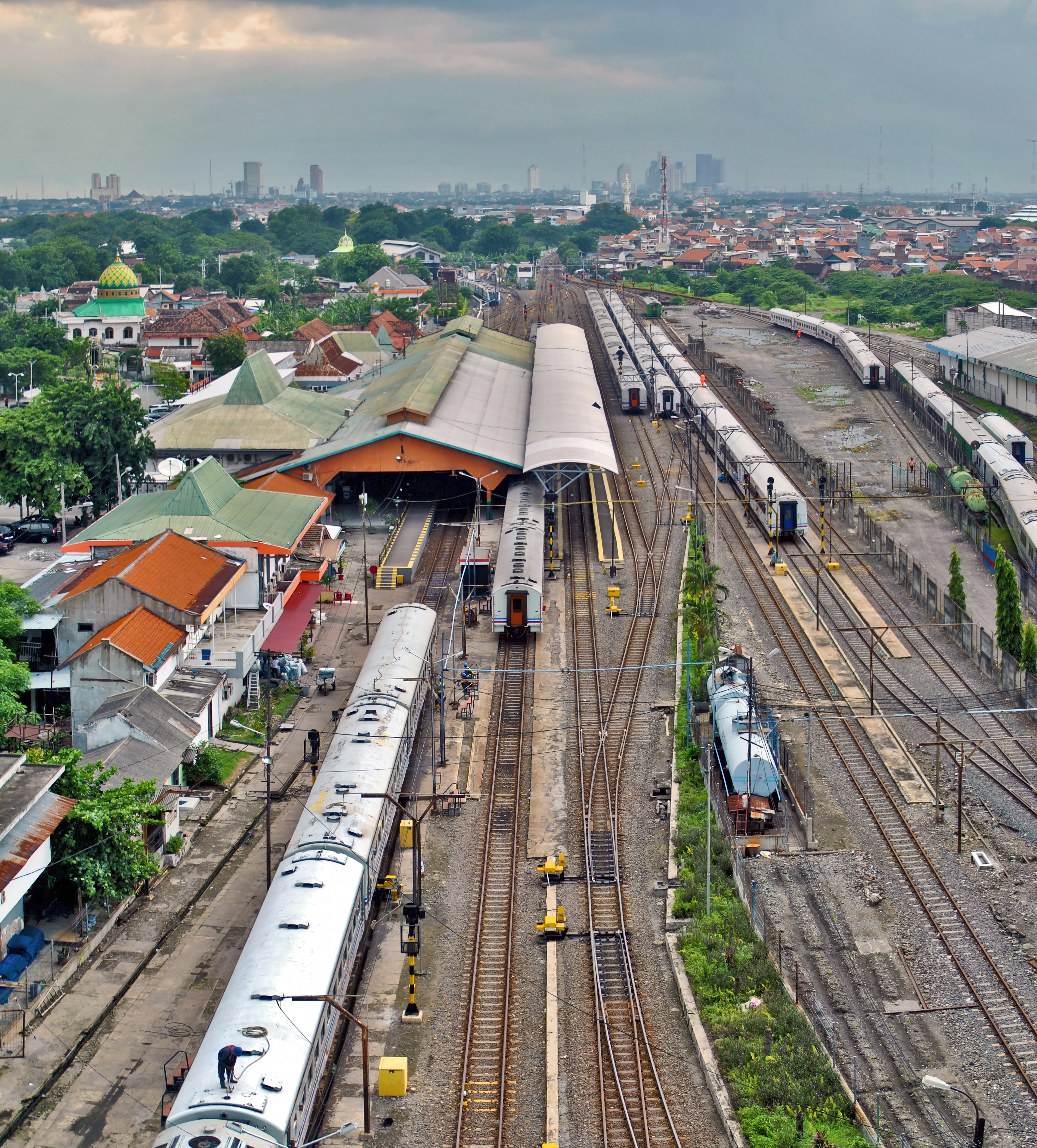 One of two railway station in Surabaya seen from Pasar Grosir Surabaya. Satu dari dua stasiun KA di Surabaya, dilihat dari Pasar Grosir Surabaya.